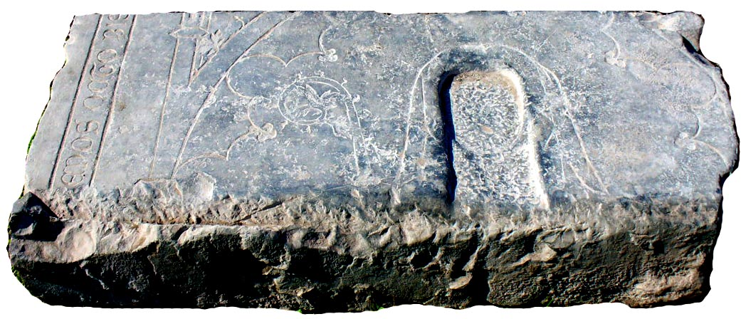 Grafsteen van Margaretha van Stein, abdis van Herkenrode van 1303 tot 1333